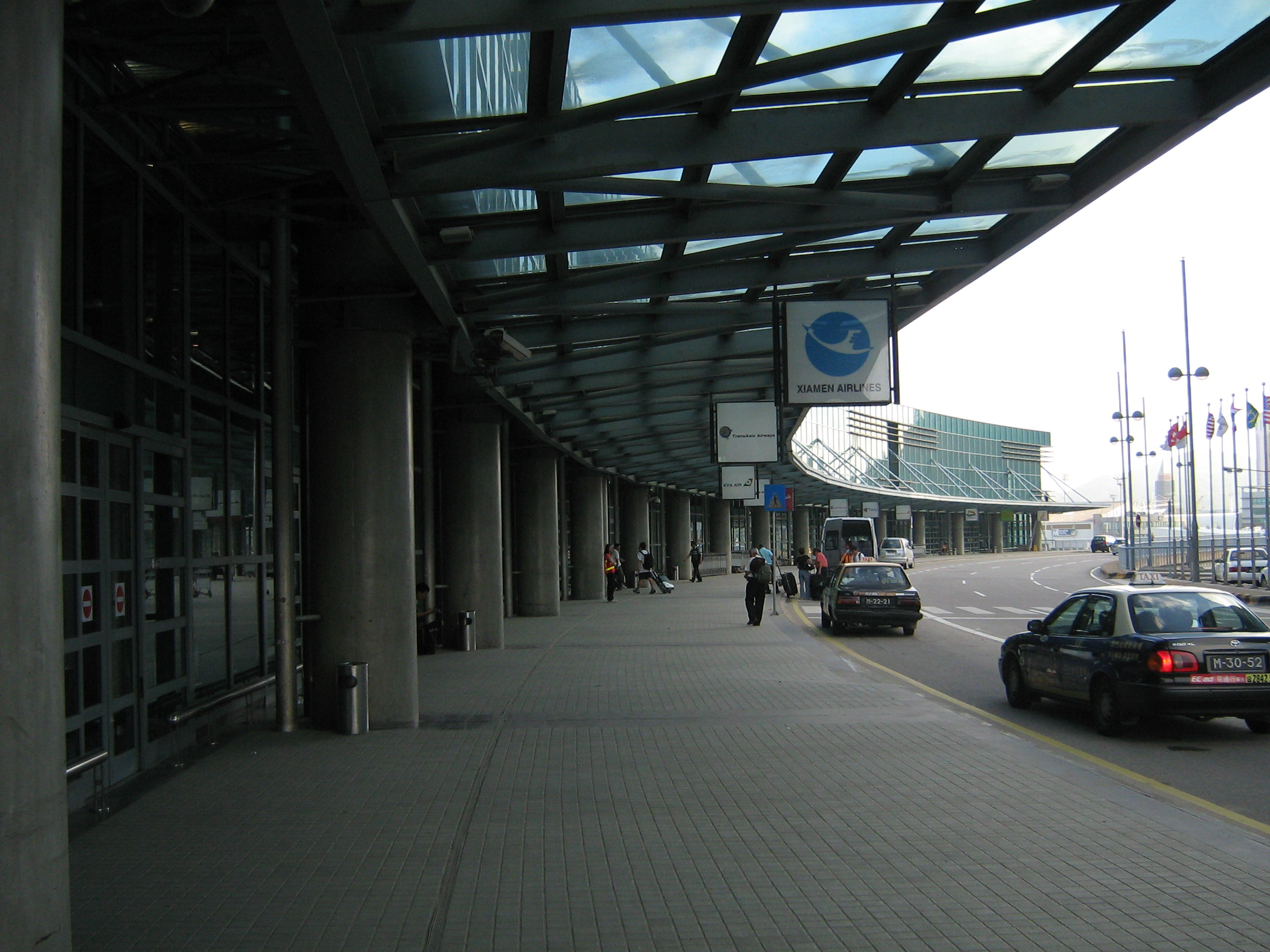 macao airport terminal